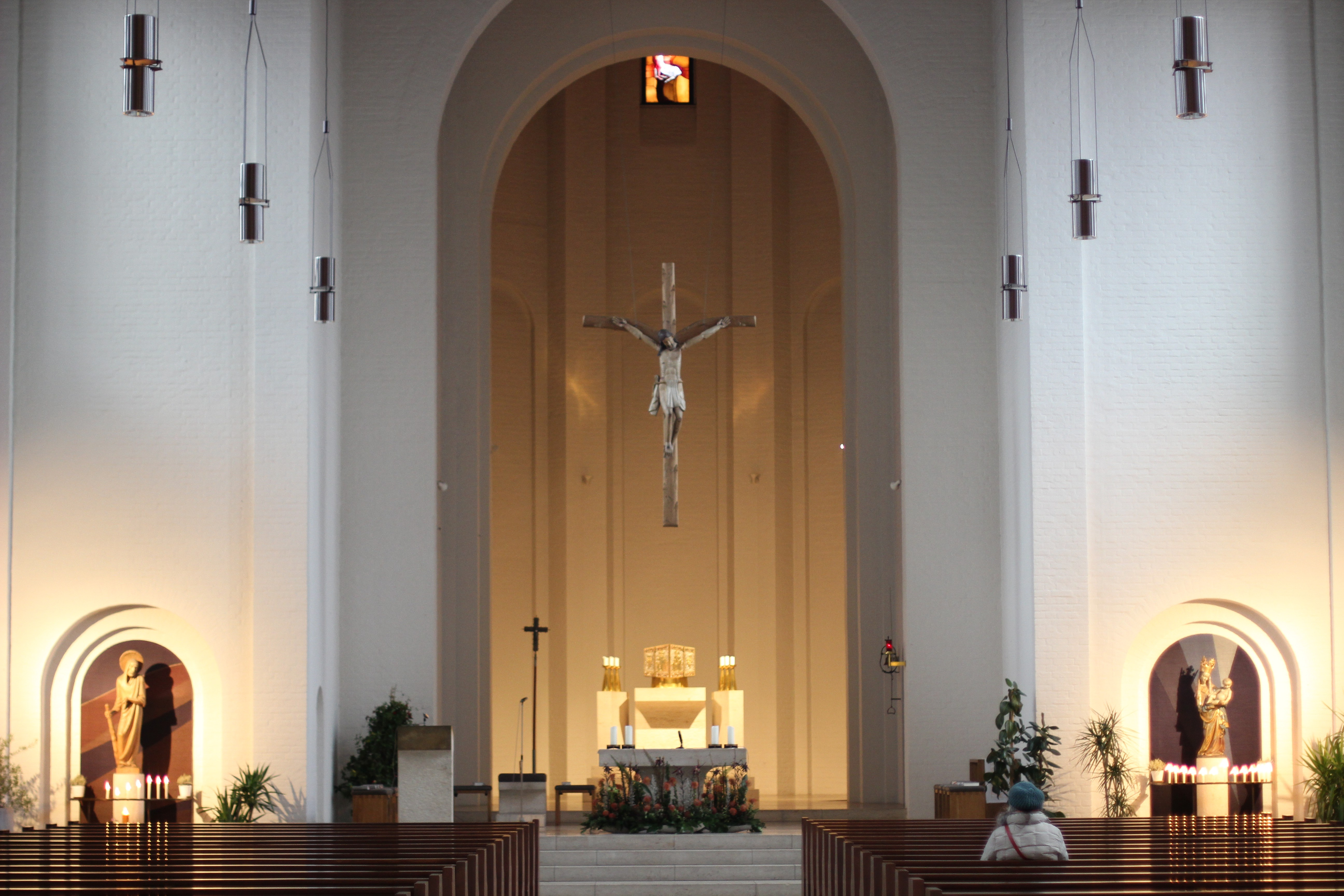 Innenansicht St. Thaddäus, Augsburg